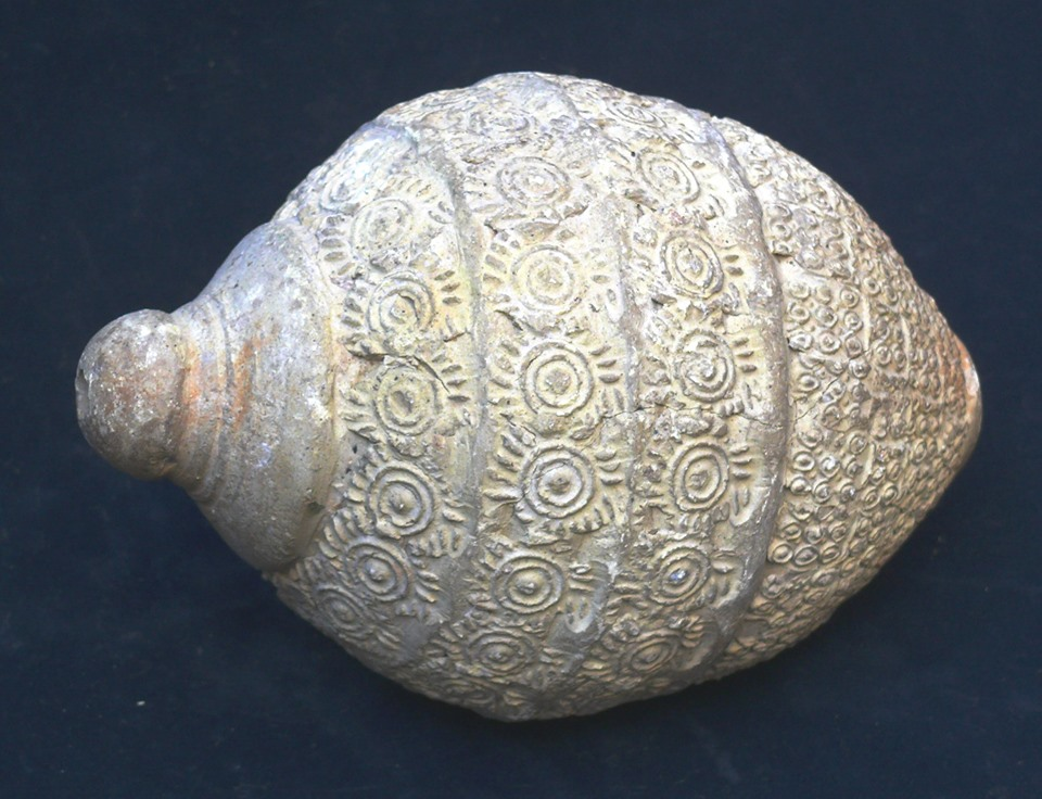 1955-ci ildə Beyləqandan tapılmış sferokonus qabın ağiz hissəsi yastı yarımkürə şəklində olub gövdəyə birləşib və mərkəzdən aşağı hissə isə gözcük şəkilli naxışlarla örtülüb. Bəzi mütəxəssislər bu qabların çıraq kimi, bəziləri civə, neft, ətriyyat daşınmasında, digərləri isə hərb işində istifadə olunduğunu iddia etmişlər. Sferokonusların şərab saxlanılması üçün istifadə olunduğu fikri də mövcuddur.